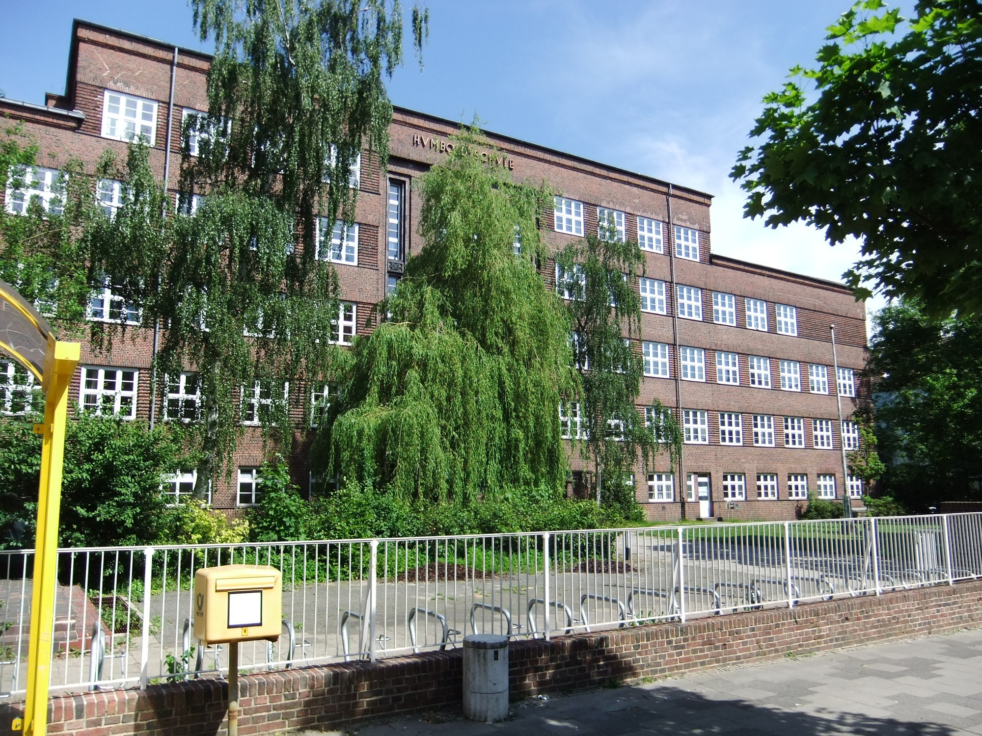 Humboldtschule in Bremerhaven, Schillerstraße 87. Das abgebildete Objekt ist ein geschütztes Kulturdenkmal in der Freien Hansestadt Bremen, mit der Nr. 1643 beim Landesamt für Denkmalpflege registriert.